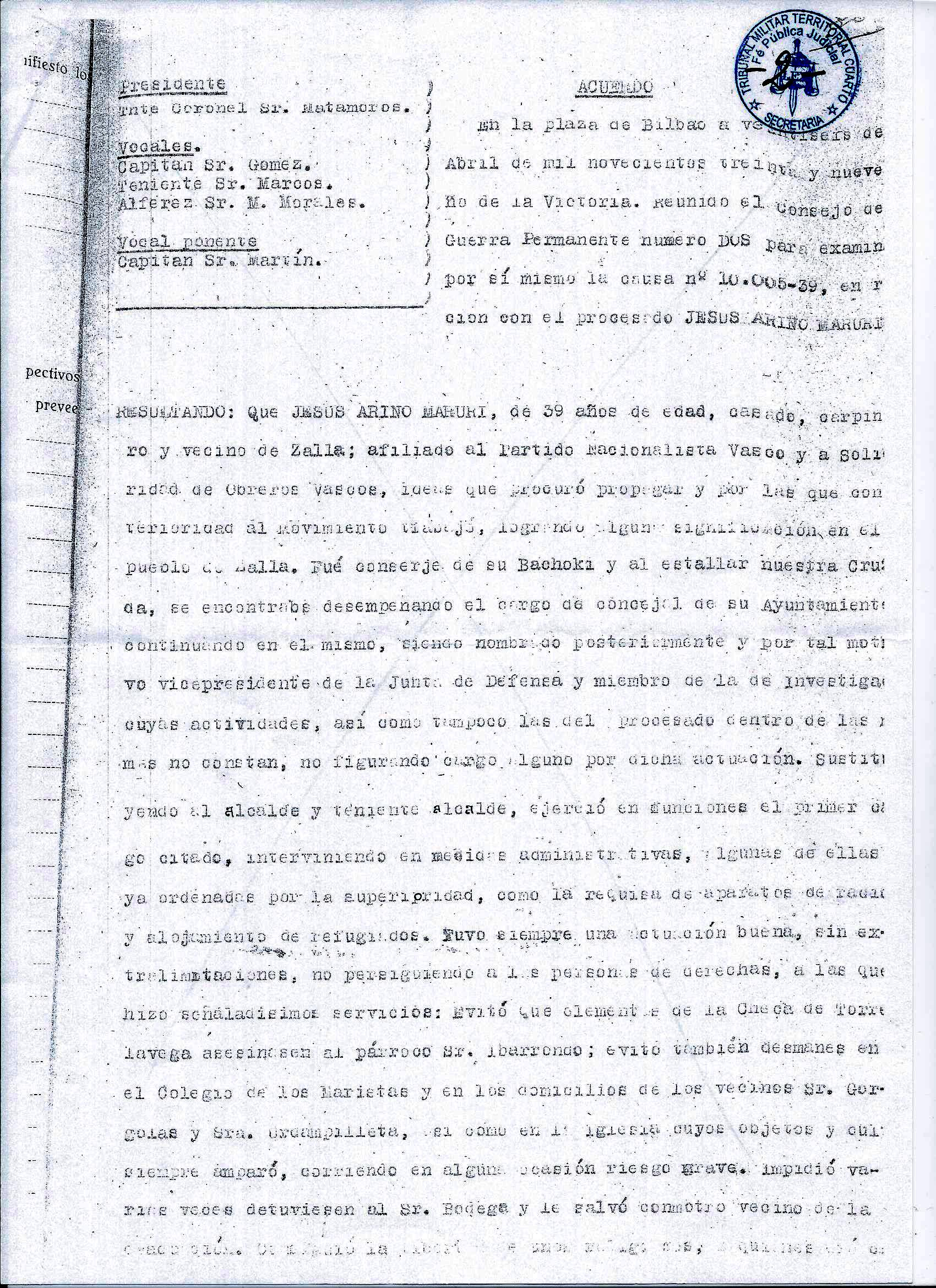 Jesus Ariño Marurik ezarrita zuen heriotz zigorra derrigorrezko lanengatik ordezkatzen duen epaia.